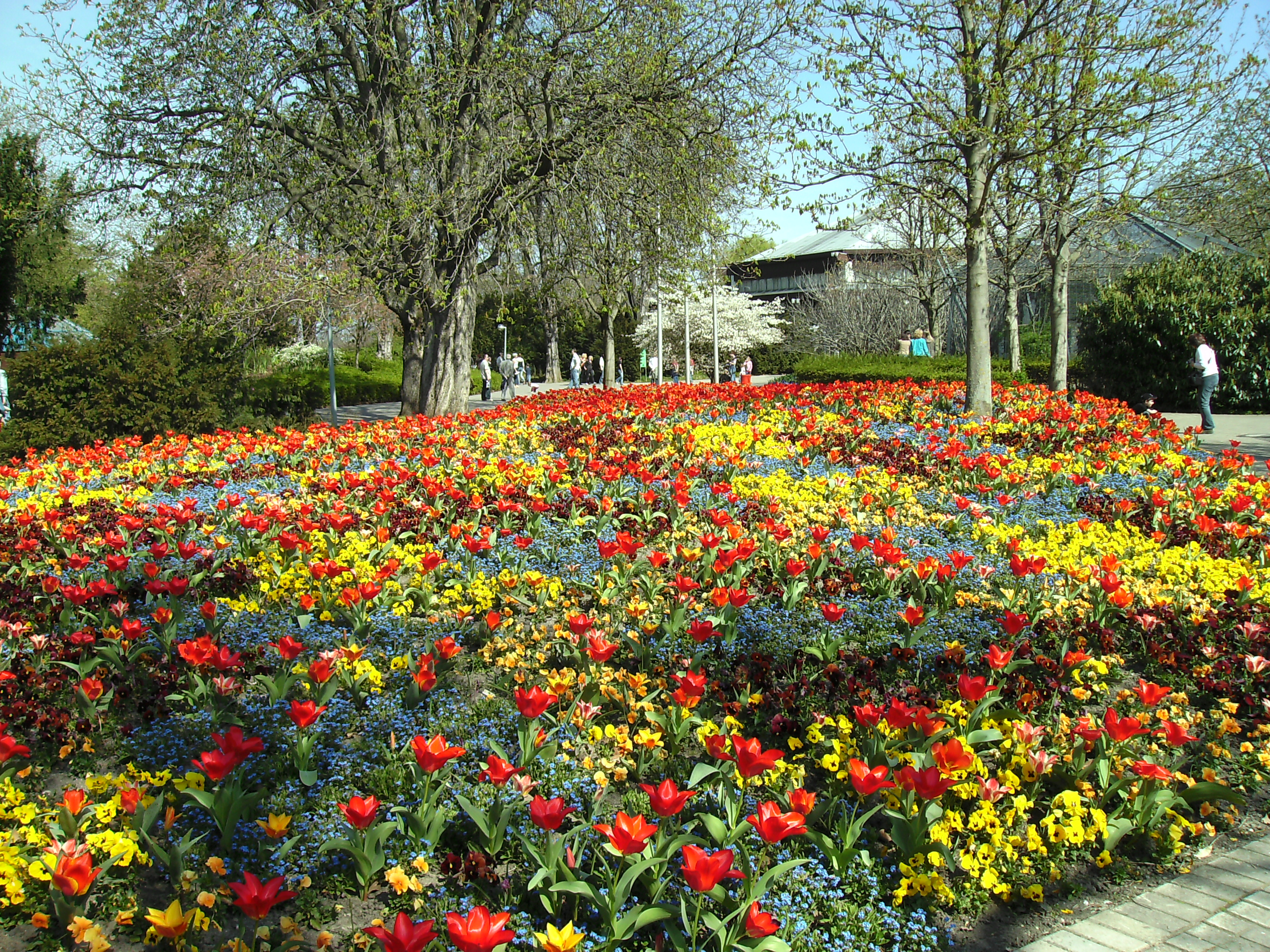 Luisengarten: Beetgestaltung im Frühling